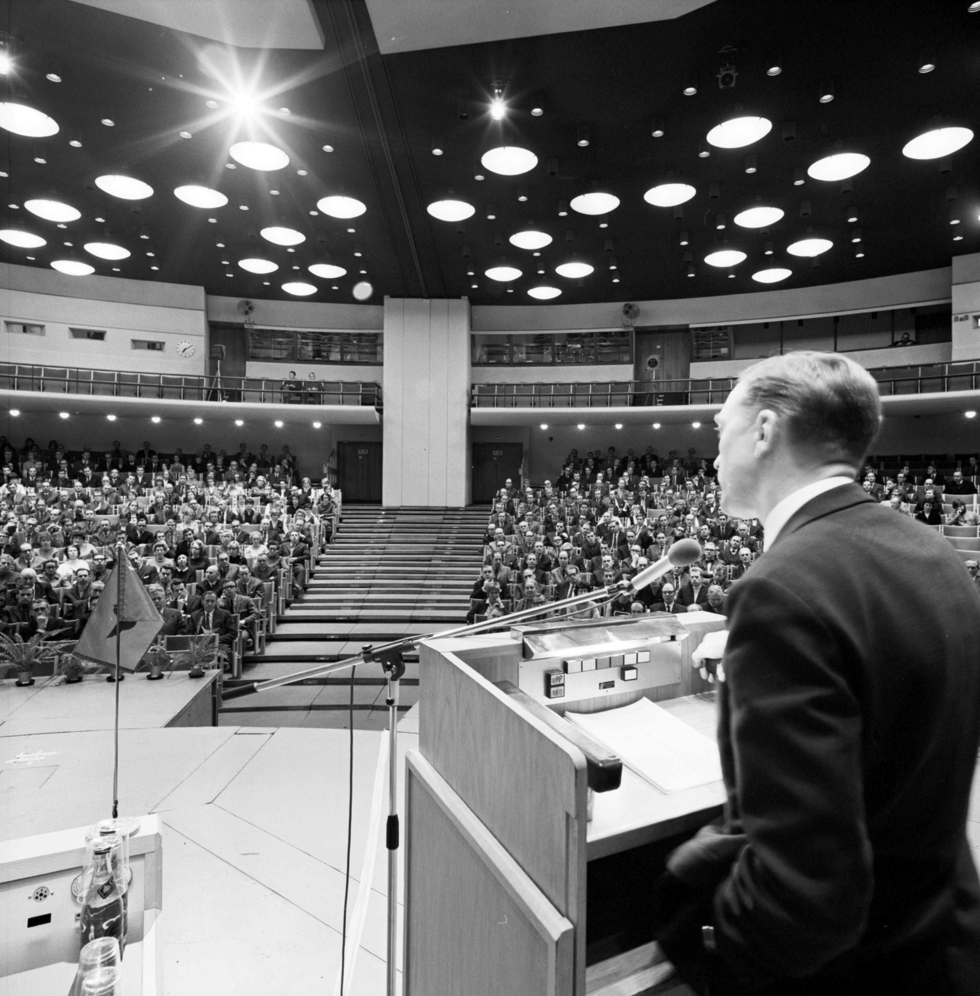 Generaldirektör Lars Peterson (1924-2009) talar till Statens Järnvägars centralförvaltning i Folkets hus, Stockholm, under ett informationsmöte.